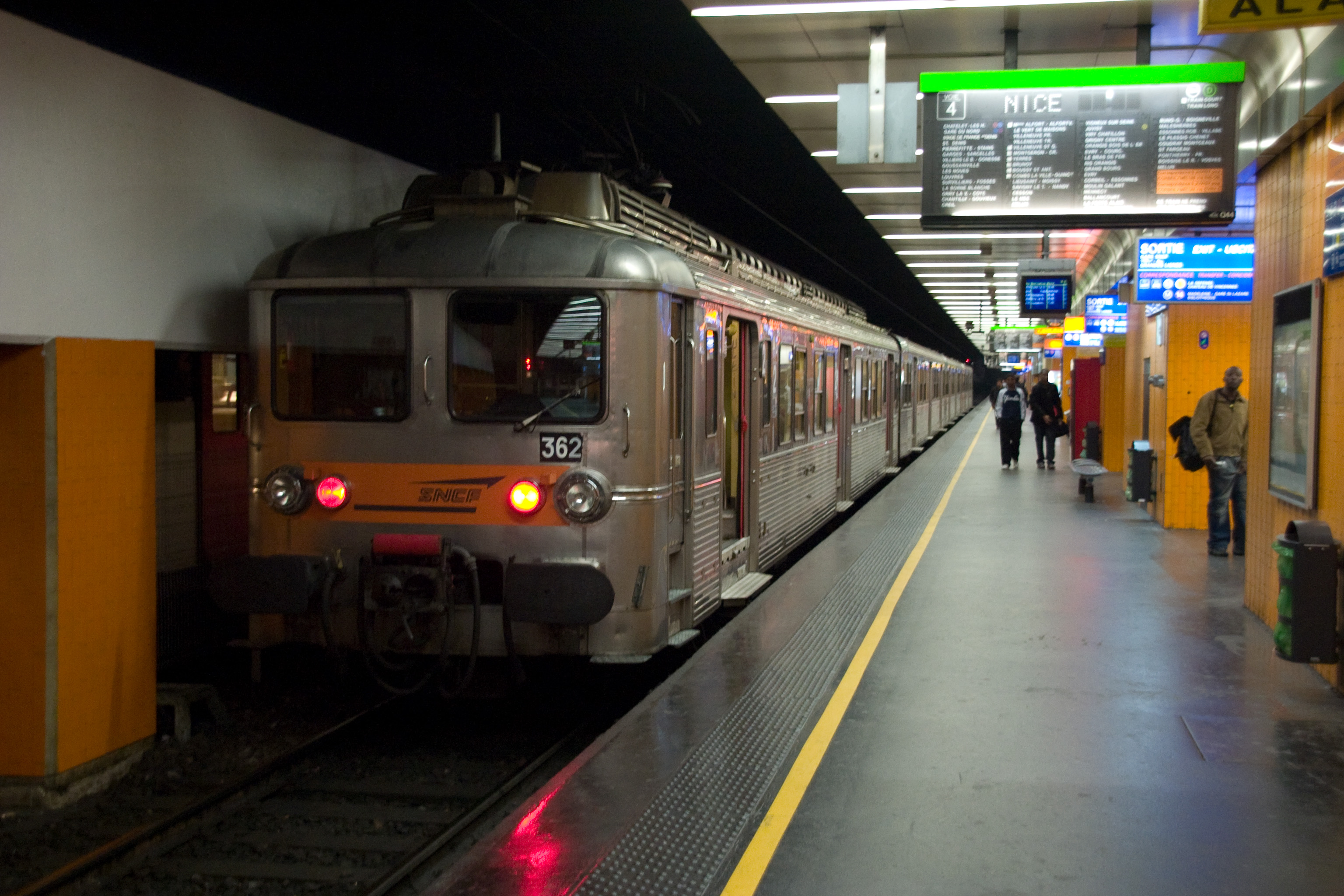 Gare de Lyon, Paris, France